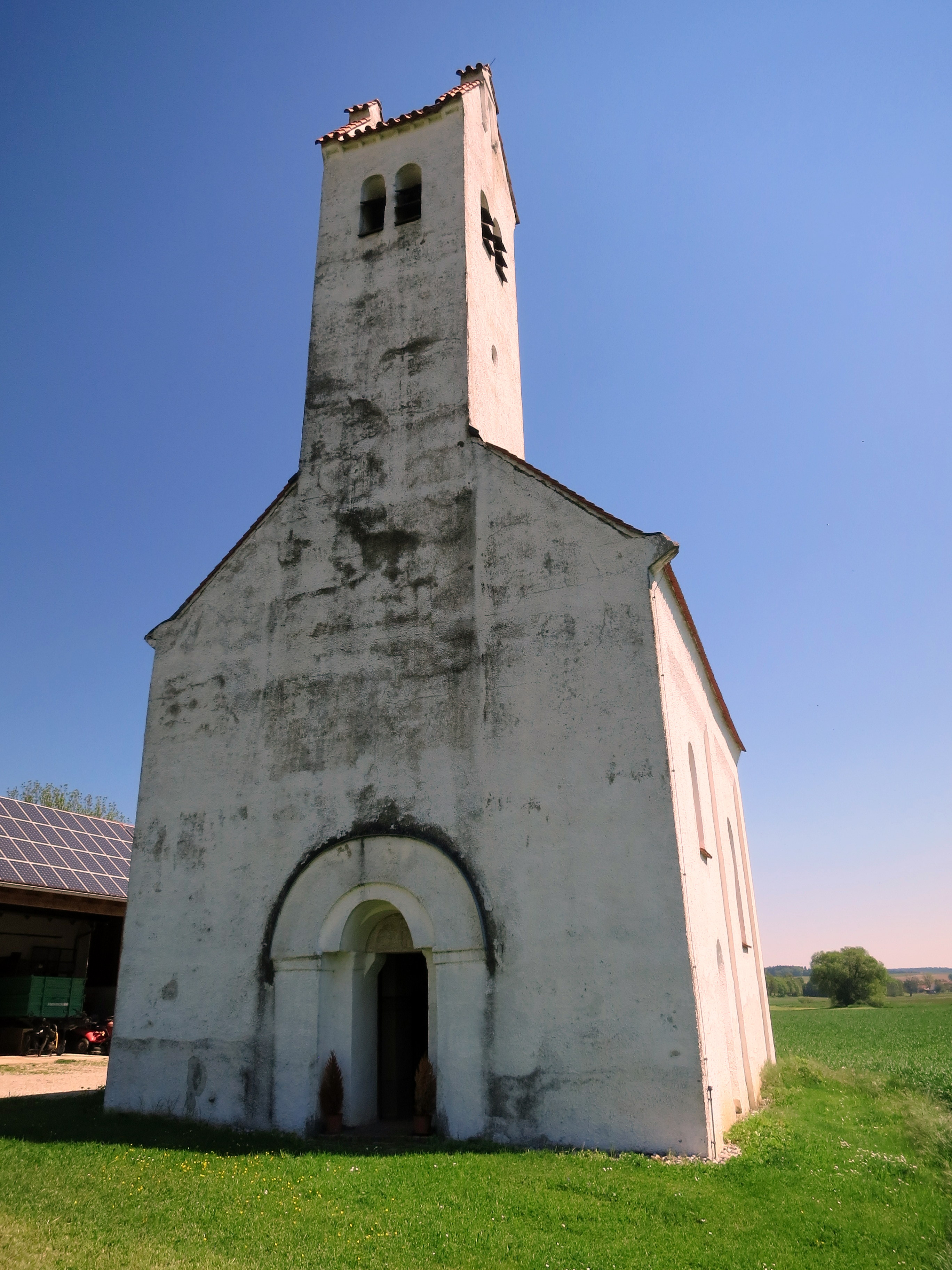 Eine romanische Kirche aus dem 12. Jahrhundert, die recht einzigartig ist.